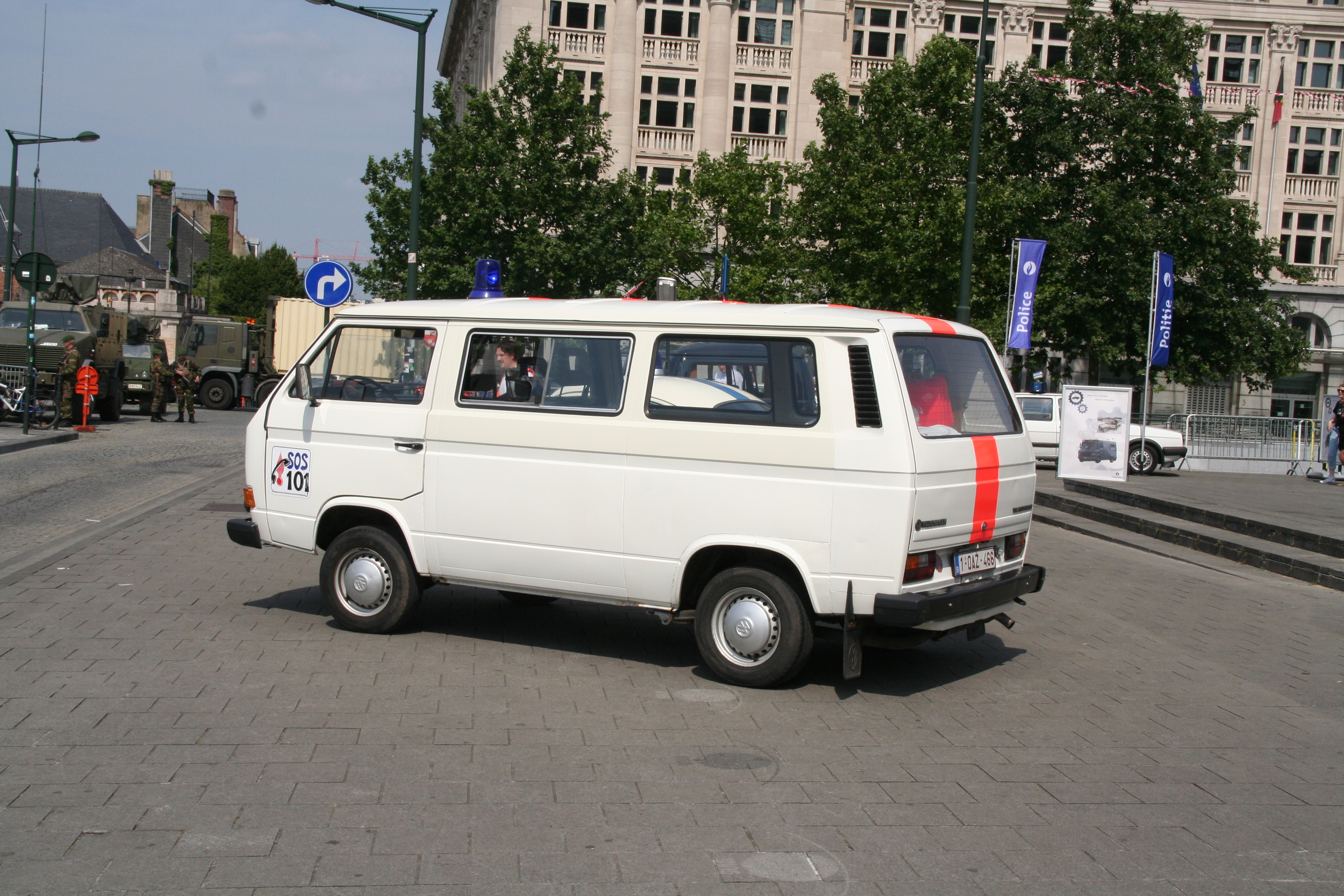 Fête nationale belge à Bruxelles le 21 juillet 2016 - VW Combi de la Gendarmerie belge